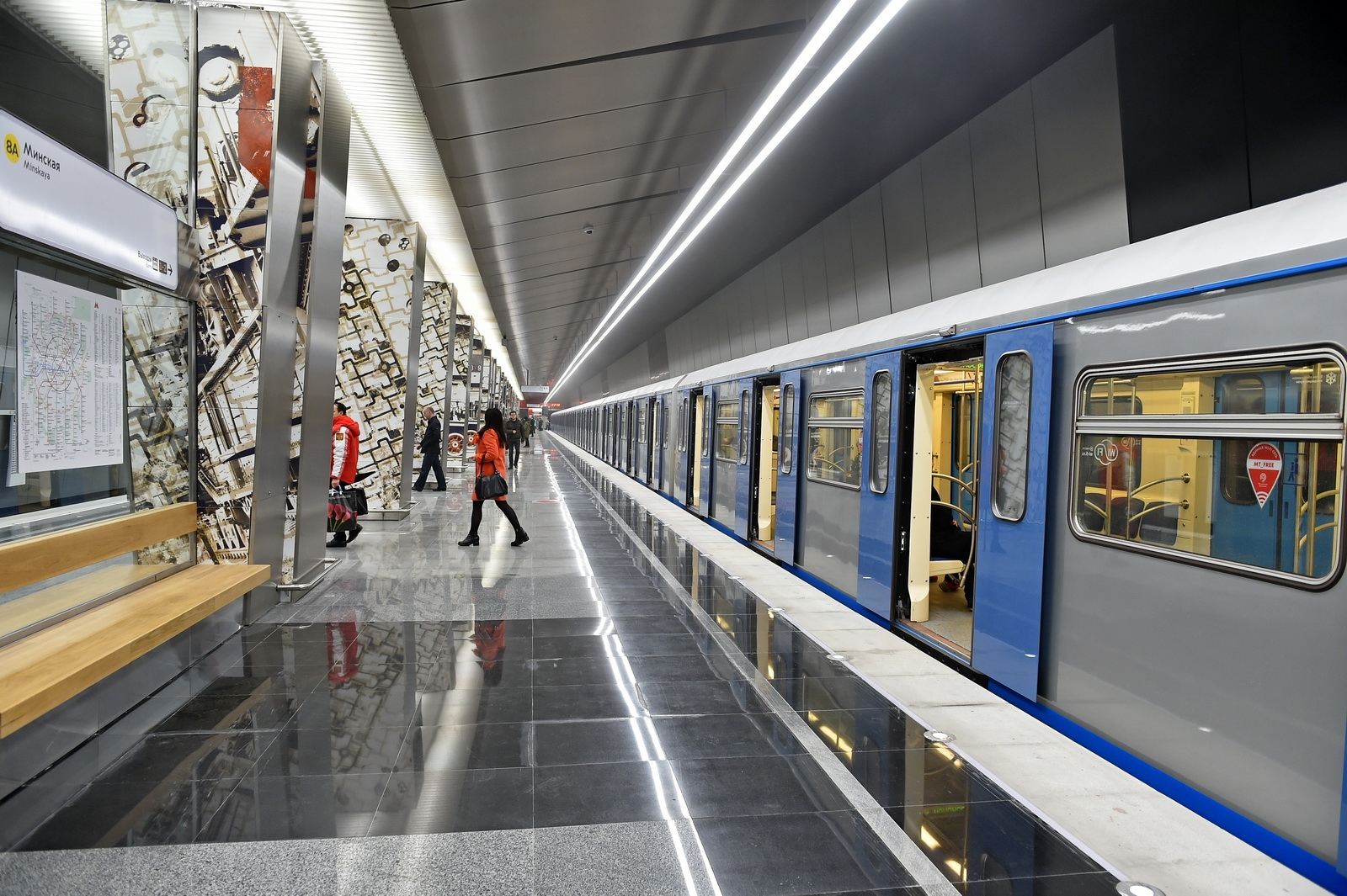 Станция Минская Московского метрополитена. Платформа и борт электропоезда 81-760/761